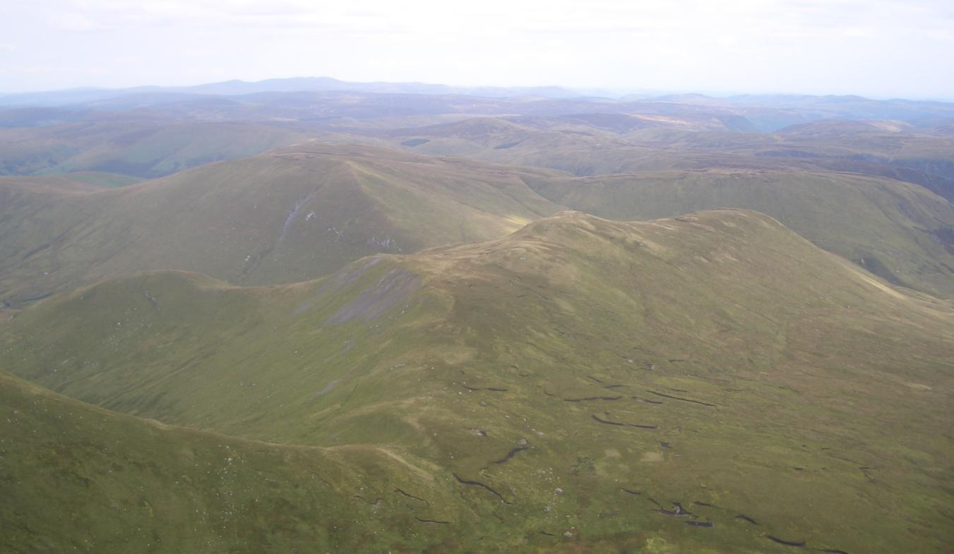 foel hafod fynydd